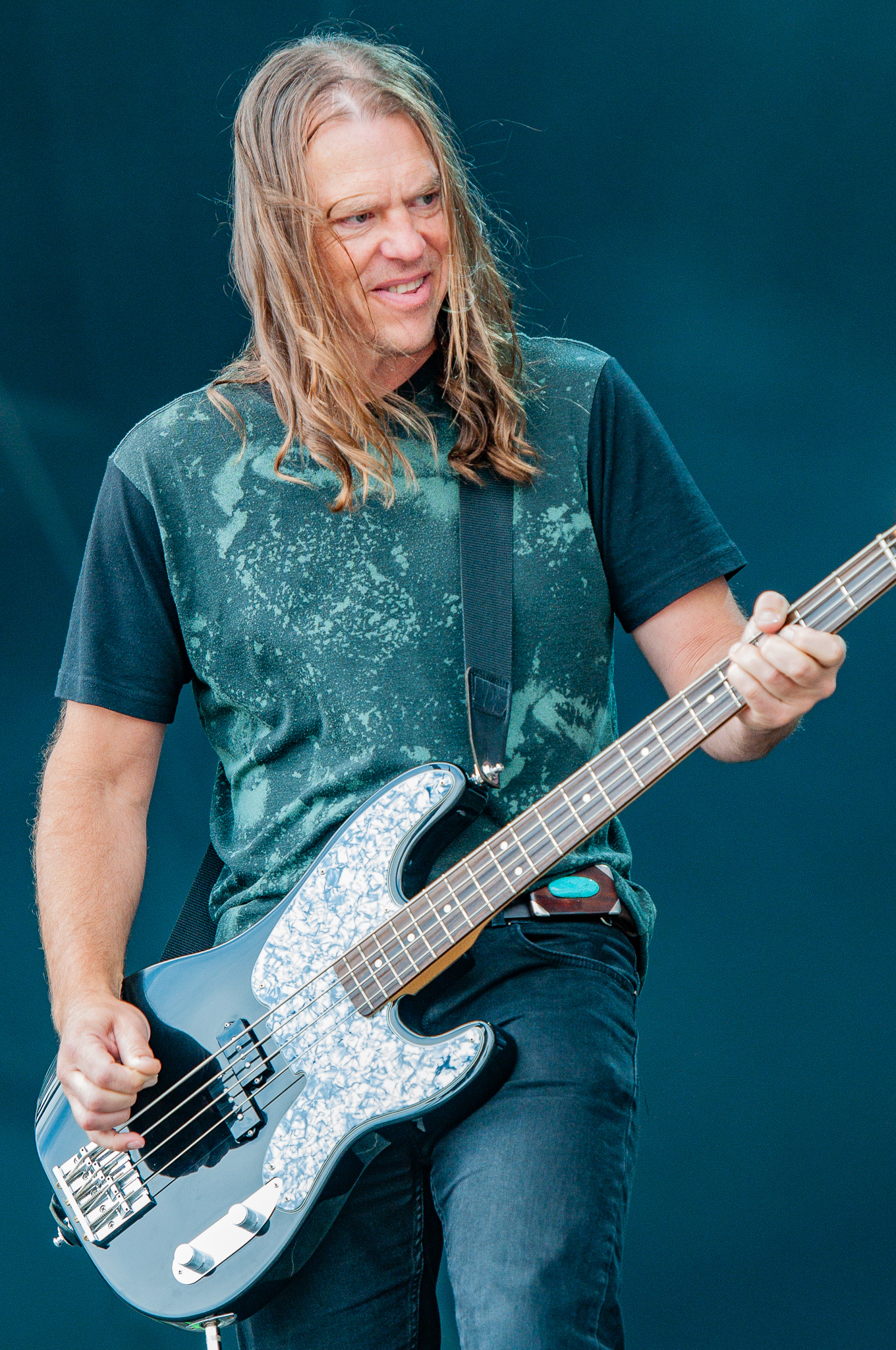 ARGO-Konzerte,Festival,Jimmy Eat World,Konzert,Livekonzert,Livemusik,Musik,RiP,Rick Burch,Rock im Park 2018,Zeppelin Stage